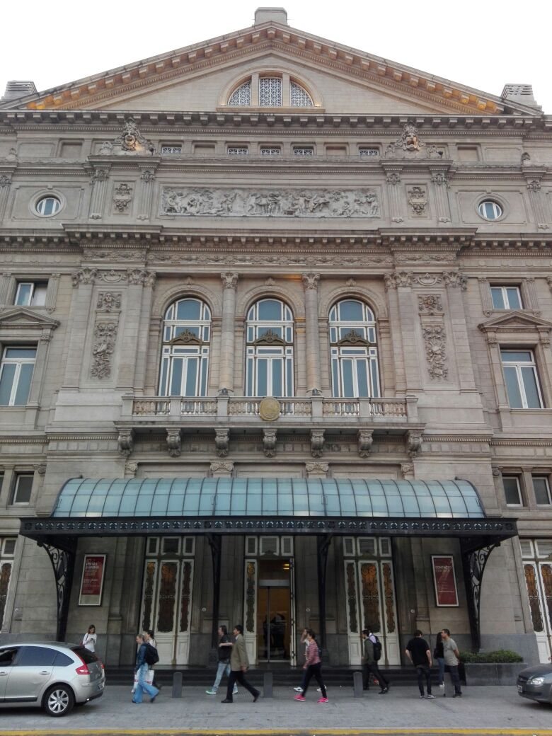 Entrada Principal al teatro